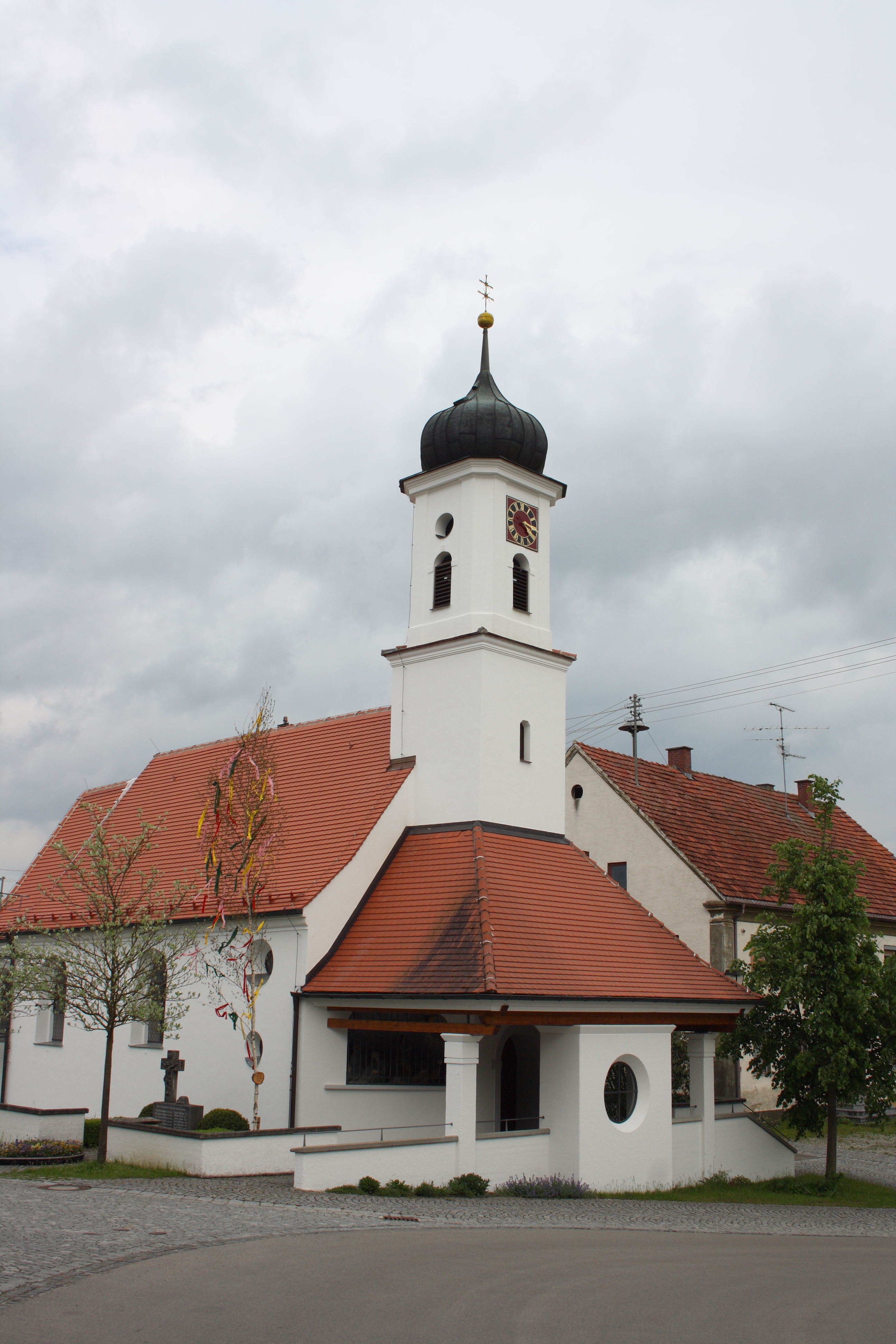 Kirche St. Leonhard in Remshart, einem Ortsteil von Rettenbach im Landkreis Günzburg (Bayern), Kirchplatzlatz 1